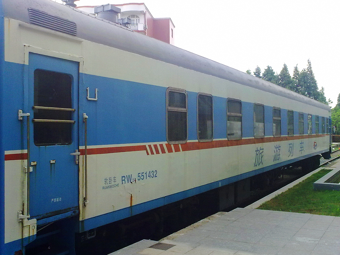 中国铁路RW24型软卧车，展示于上海淞沪铁路江湾站旧址纪念公园